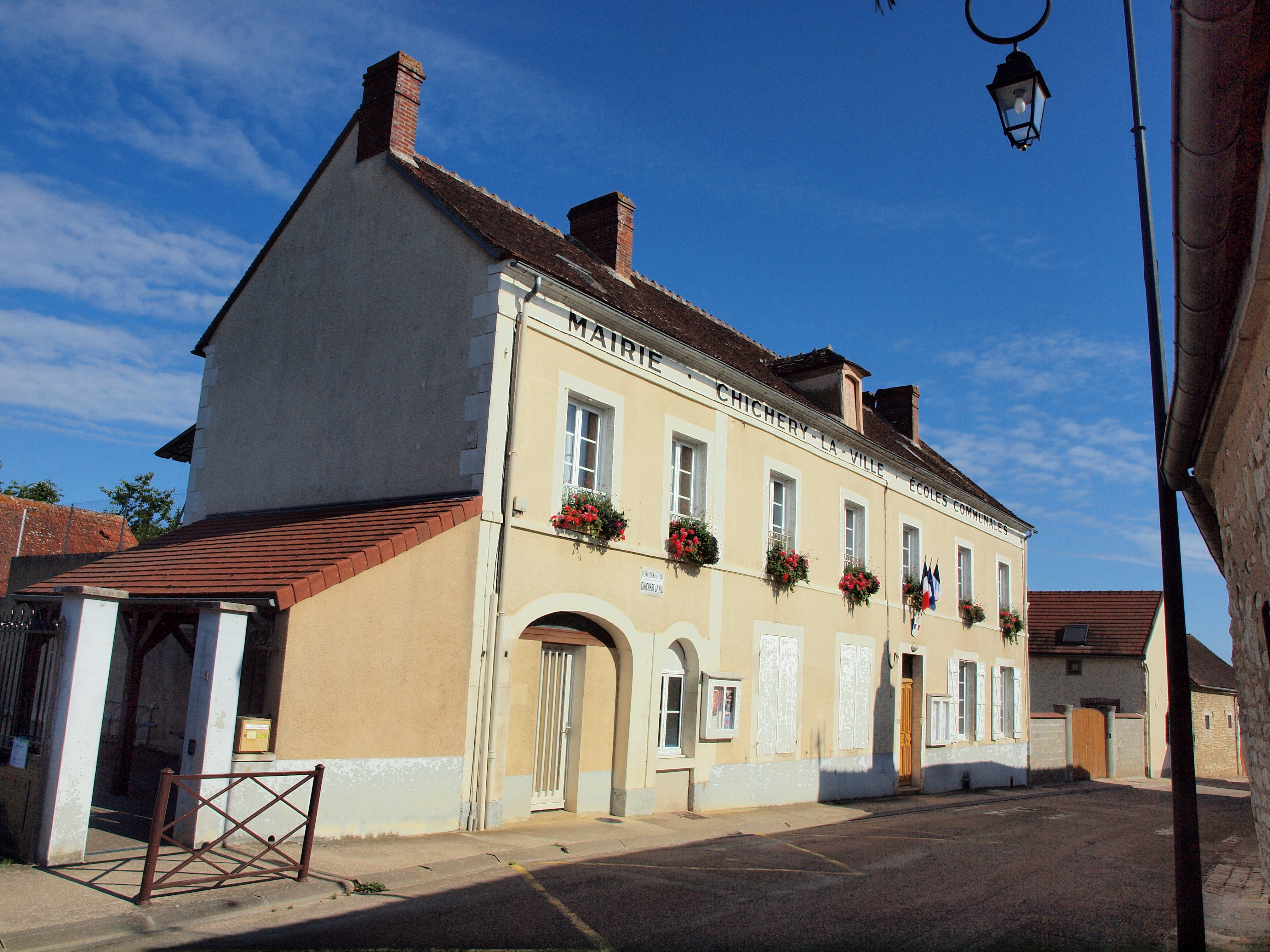 Mairie de Chichery-la-Ville (Yonne, France)